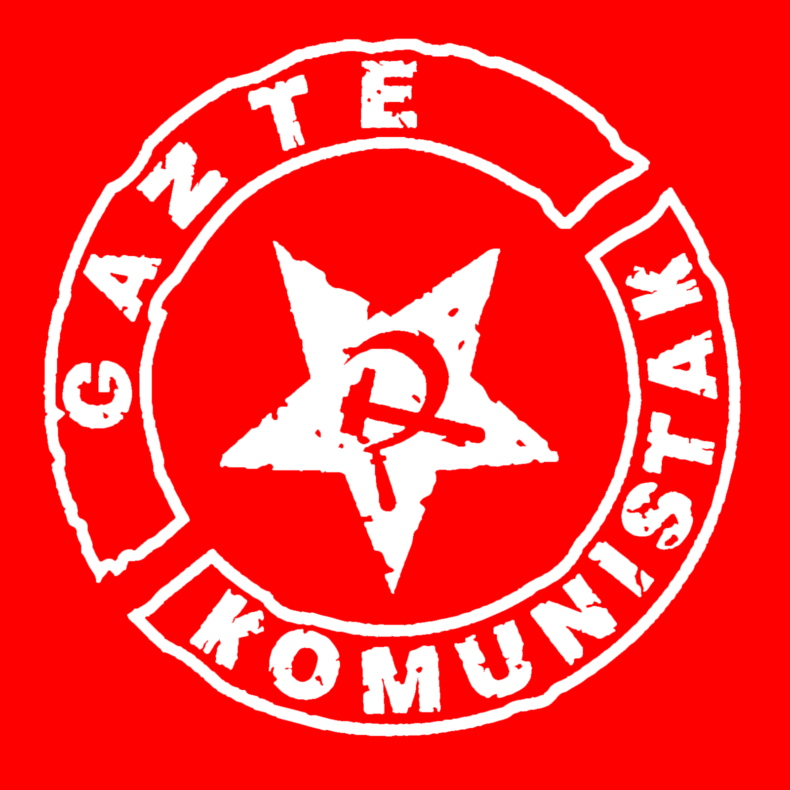 Nuevo logo de Gazte Komunistak tras su integración en la UJCE el 5 de septiembre de 2015